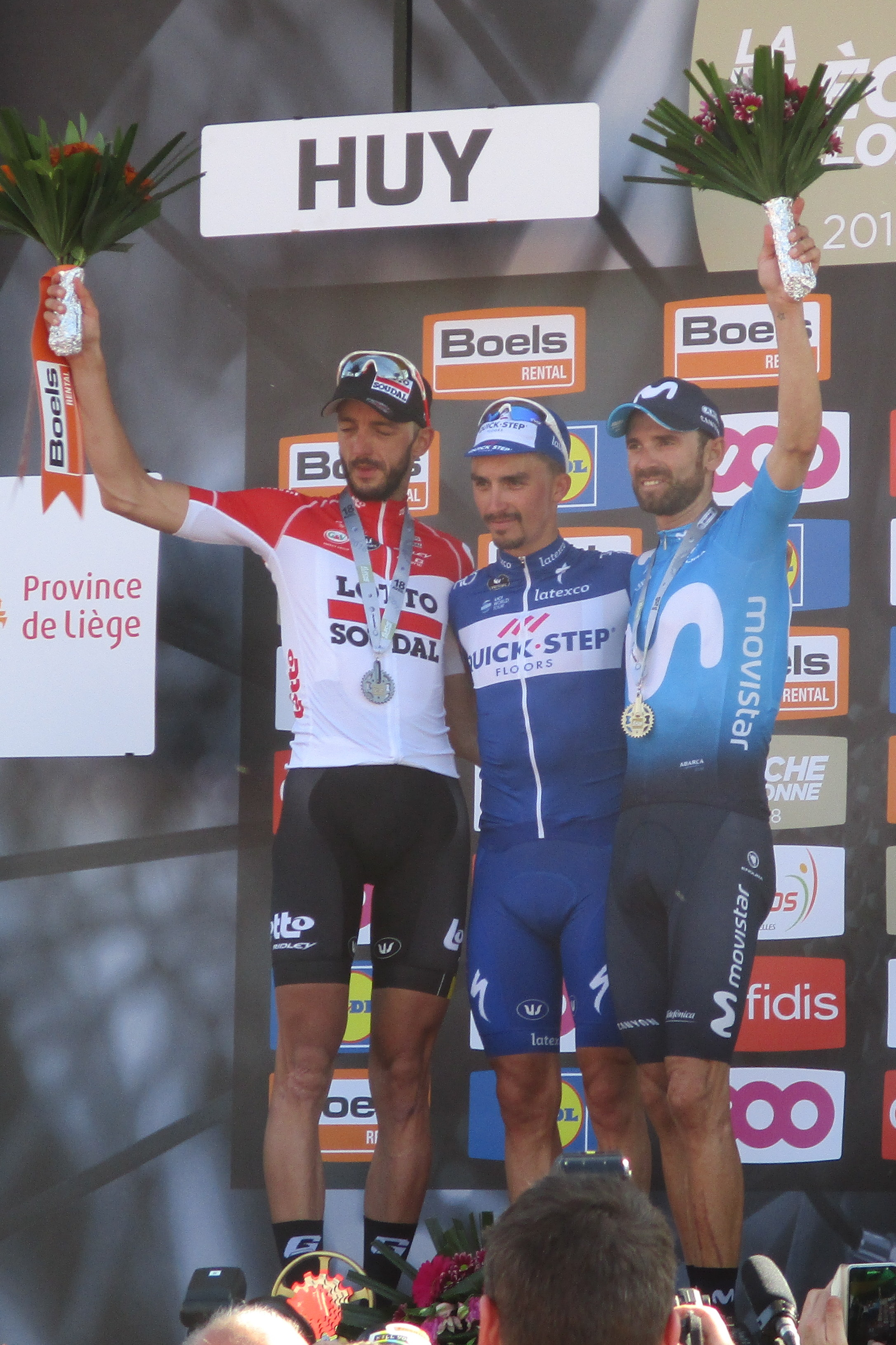 Waalse Pijl 2018 op de Mur van Huy. 1. Julian Alaphilippe; 2. Alejandro Valverde; 3. Jelle Vanendert